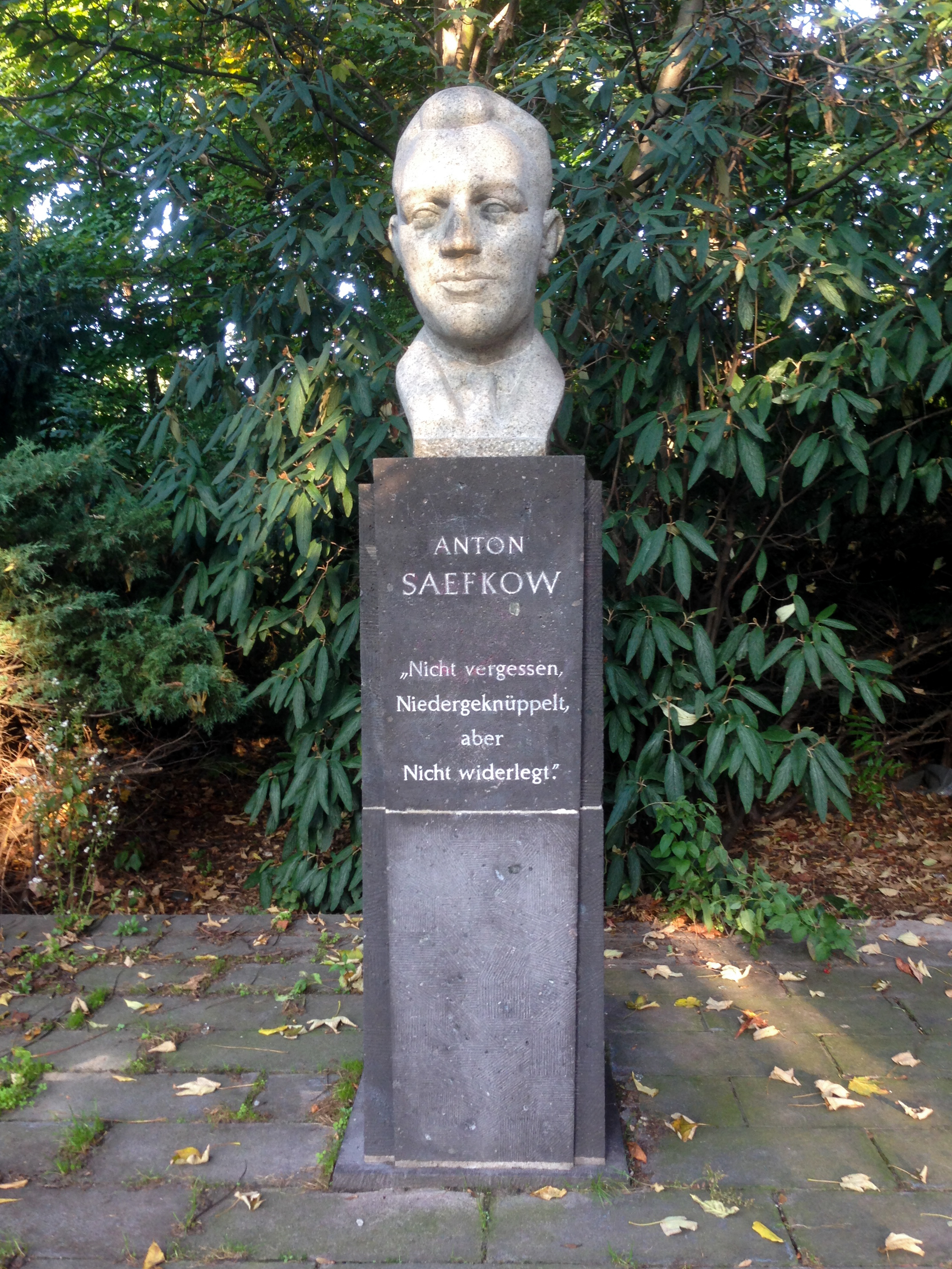 Standort Anton-Saefkow-Straße 26, in Berlin-Prenzlauer Berg